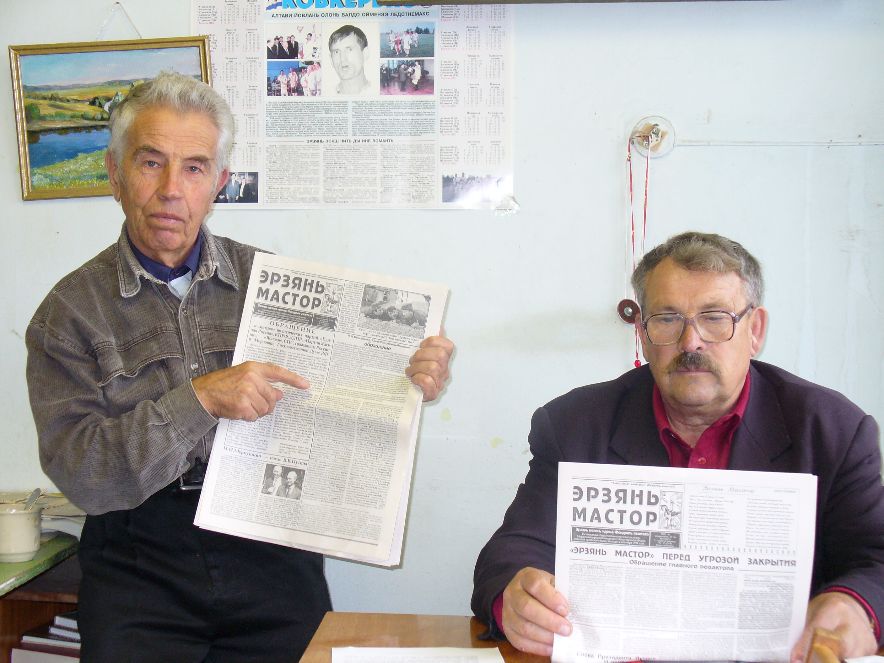 Издатели газеты "Эрзянь Мастор" (Евгений Четвергов и Григорий Мусалёв)